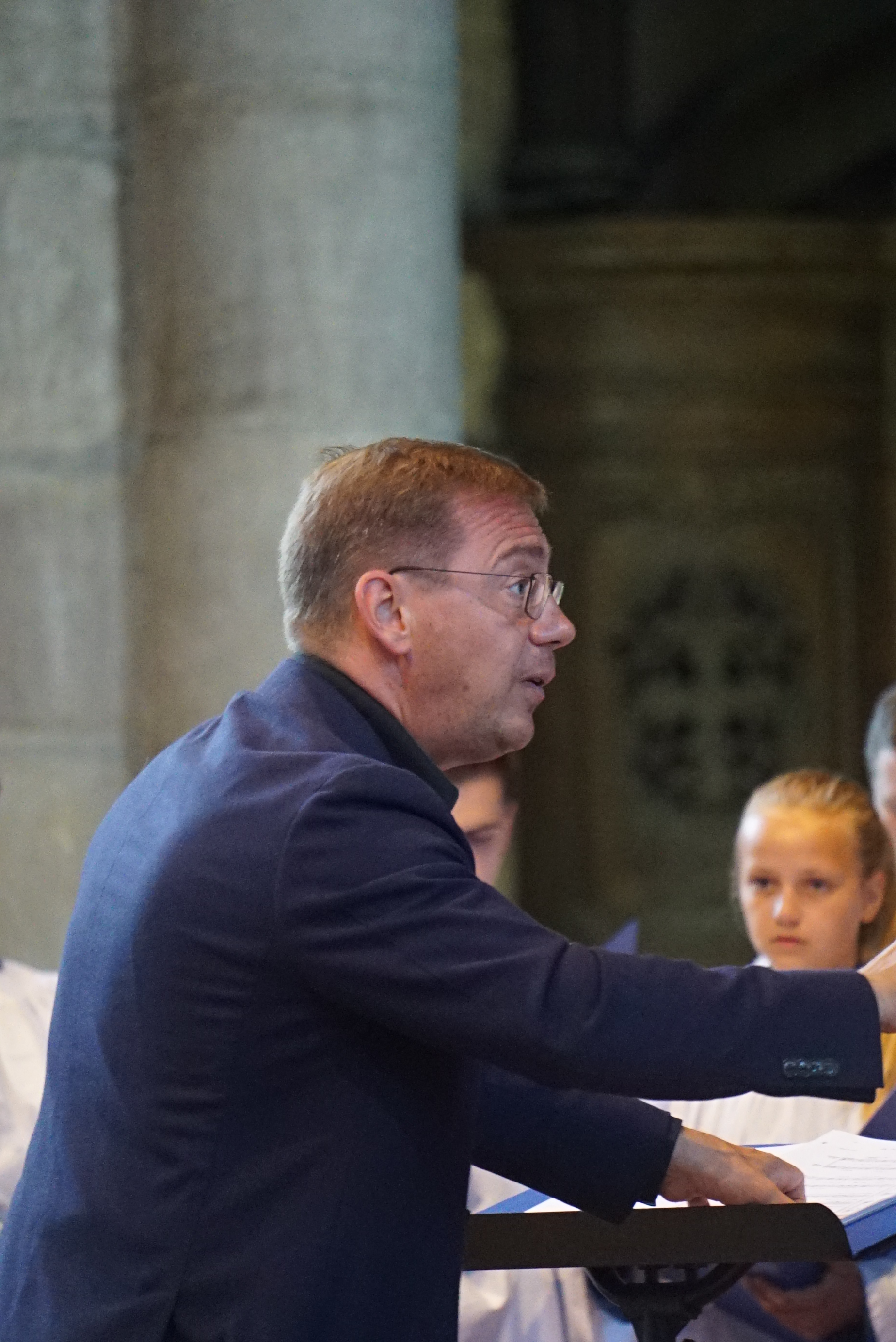 en concert à la cathédrale de Reims.